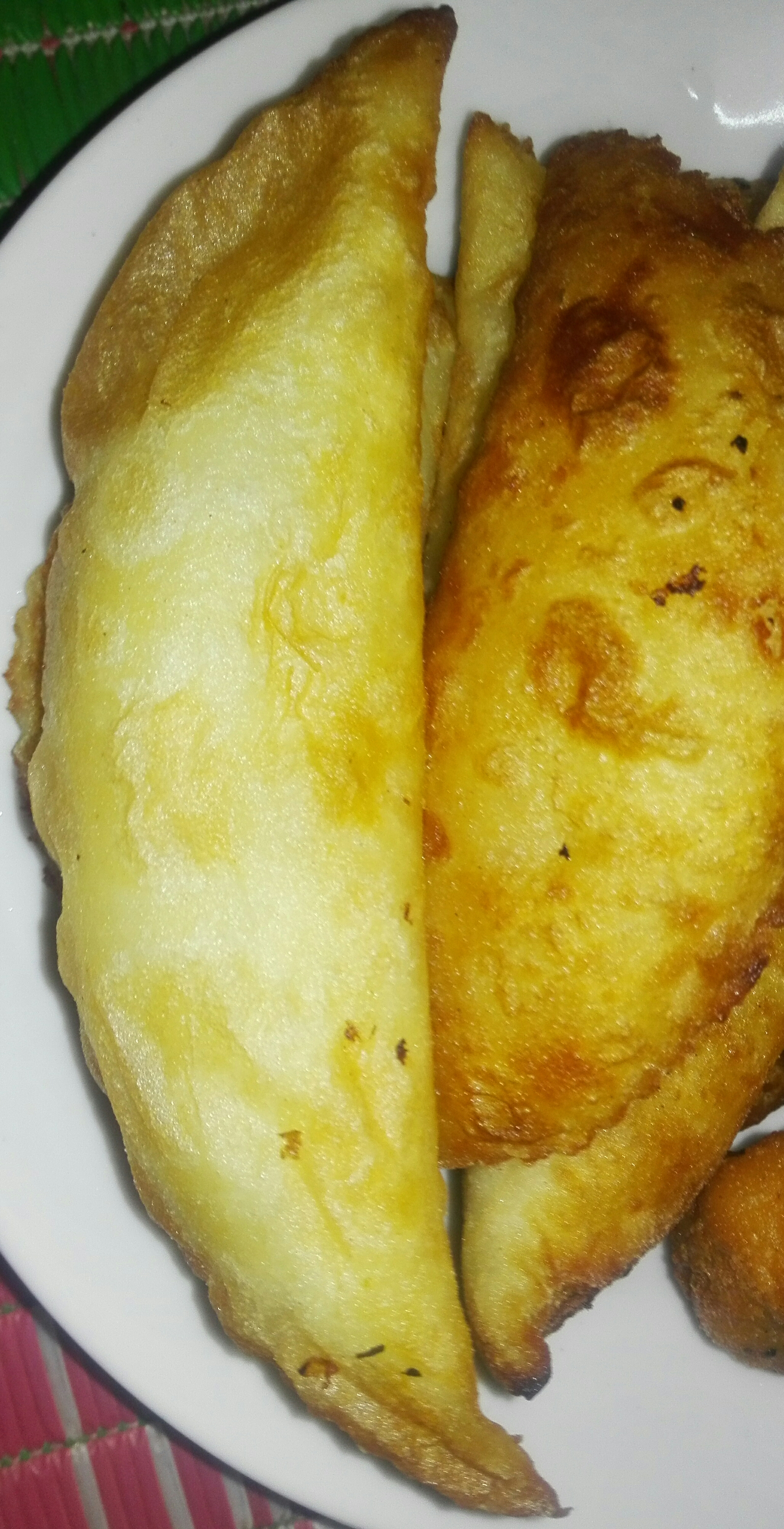 puli pitha